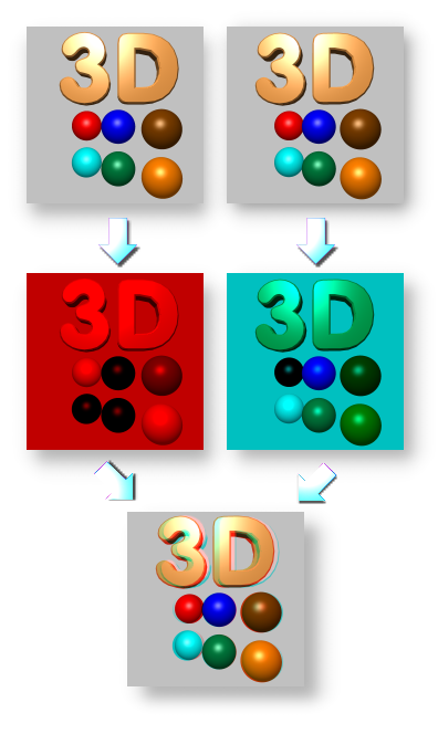 Schema der Erzeugung von farbigen Anaglyphbilder für die Betrachtung mit Rot-Cyan-Brillen